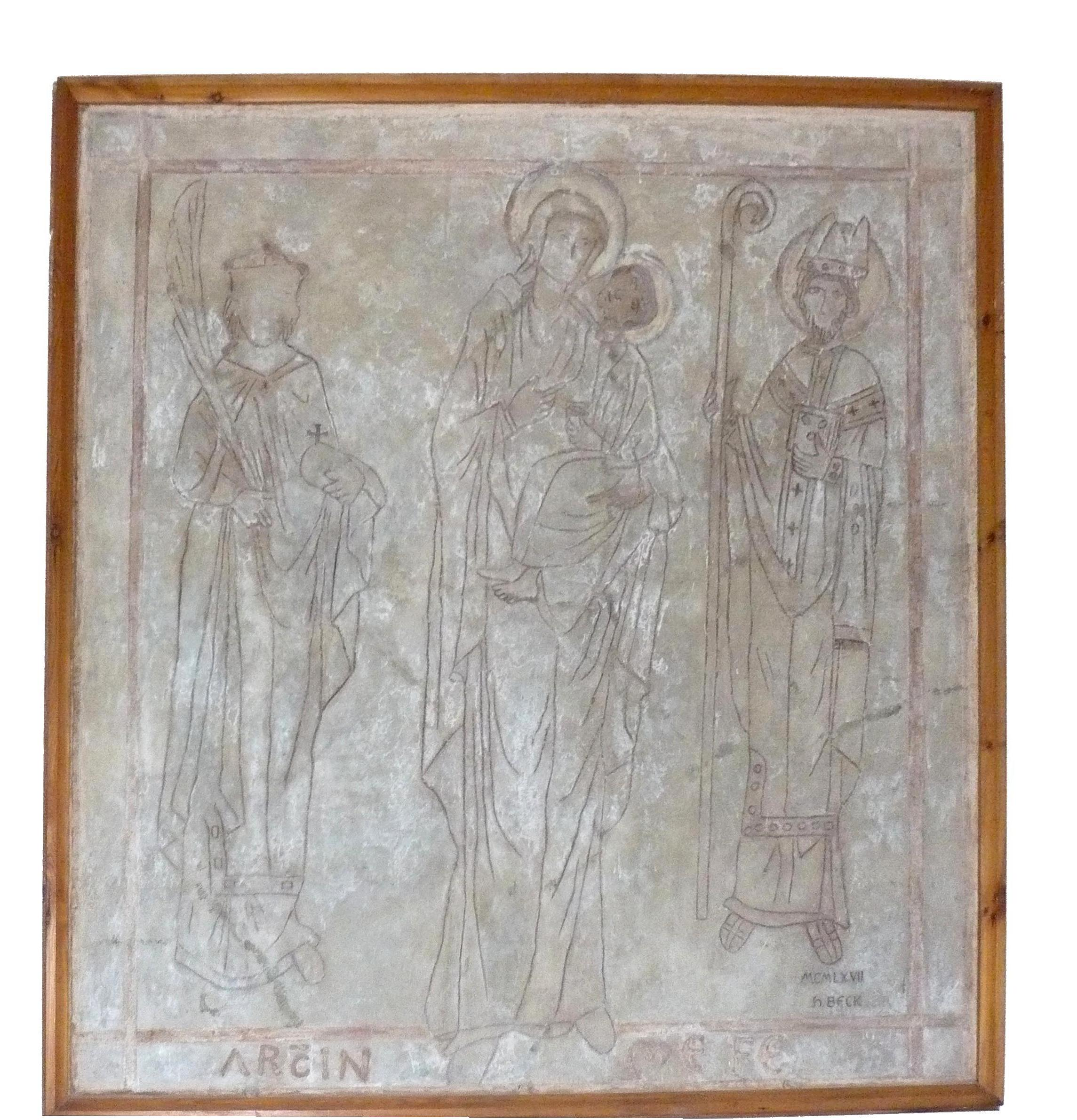 Friedenskirche in Aue-Zelle: Kopie des Putzritzbildes